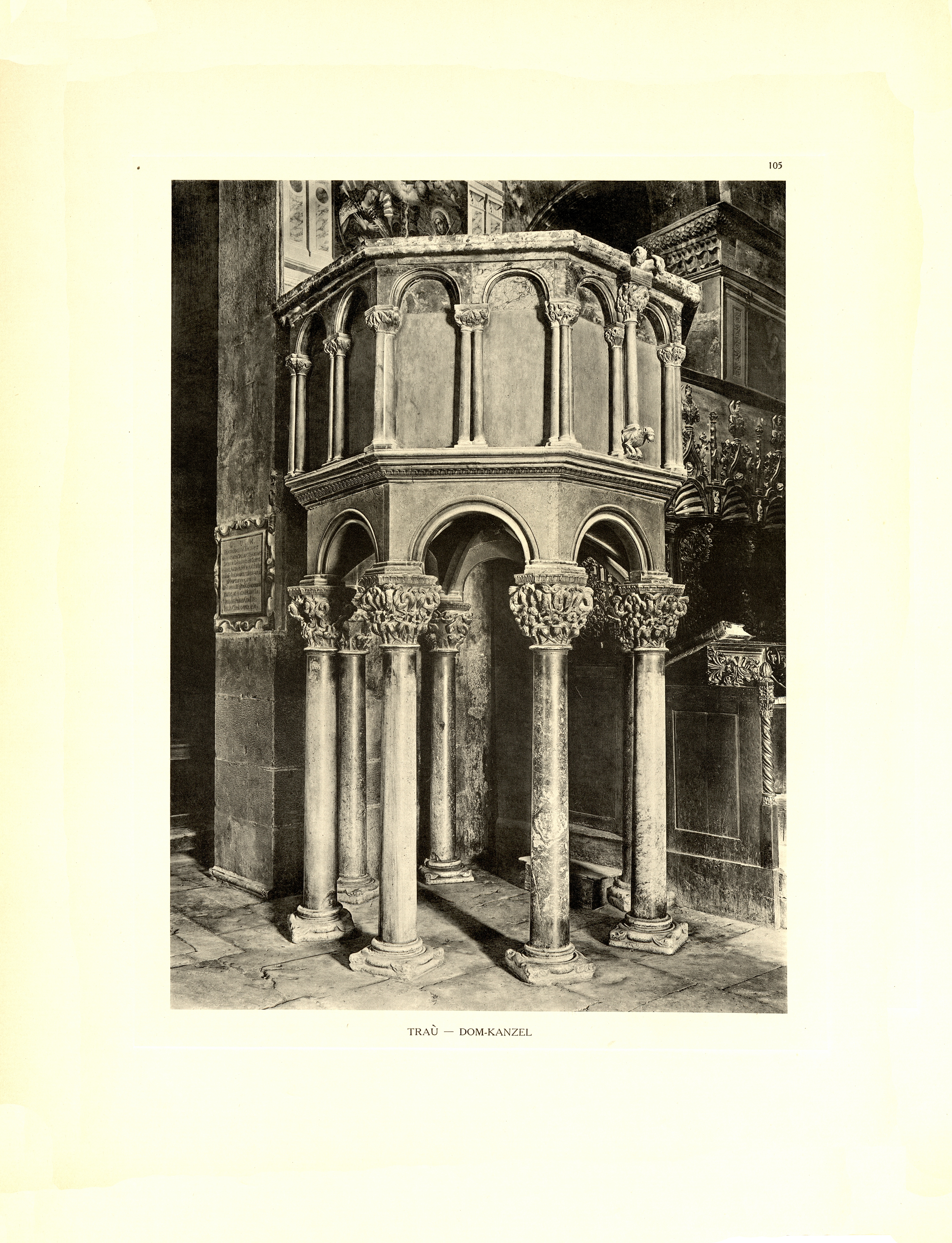 Denkmäler der Kunst in Dalmatien, Herausgegeben von Georg Kowalczyk, mit einer Einleitung von Cornelius Gurlitt. 132 Lichtdrucktafeln nach Naturaufnahmen des Herausgebers Georg Kowalczyk sowie nach Kupfern aus dem Werke von Robert Adam: Ruins of the Palace of the Emperor Diocletian at Spalat(r)o, 1764 Wien, 1910, Verlag von Franz Malota